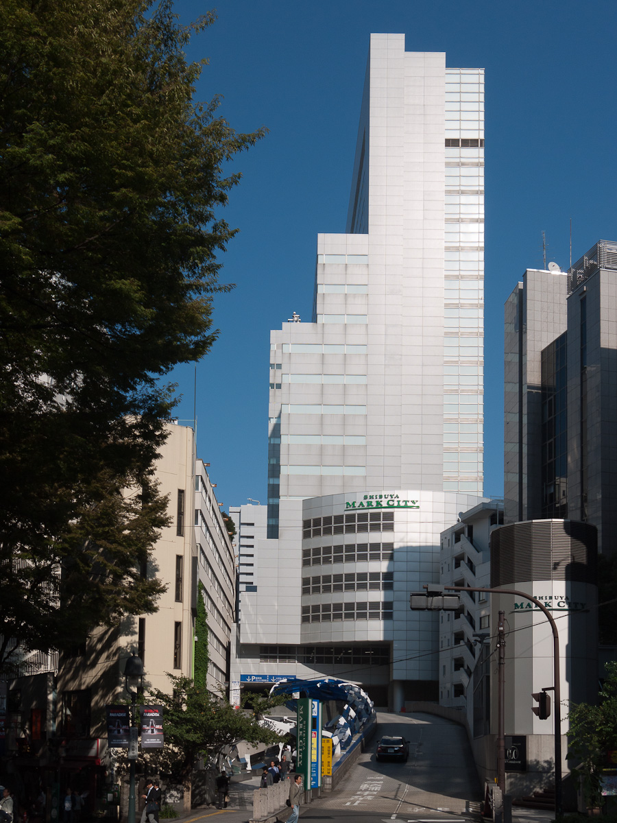 「渋谷マークシティWest」、道玄坂上から。